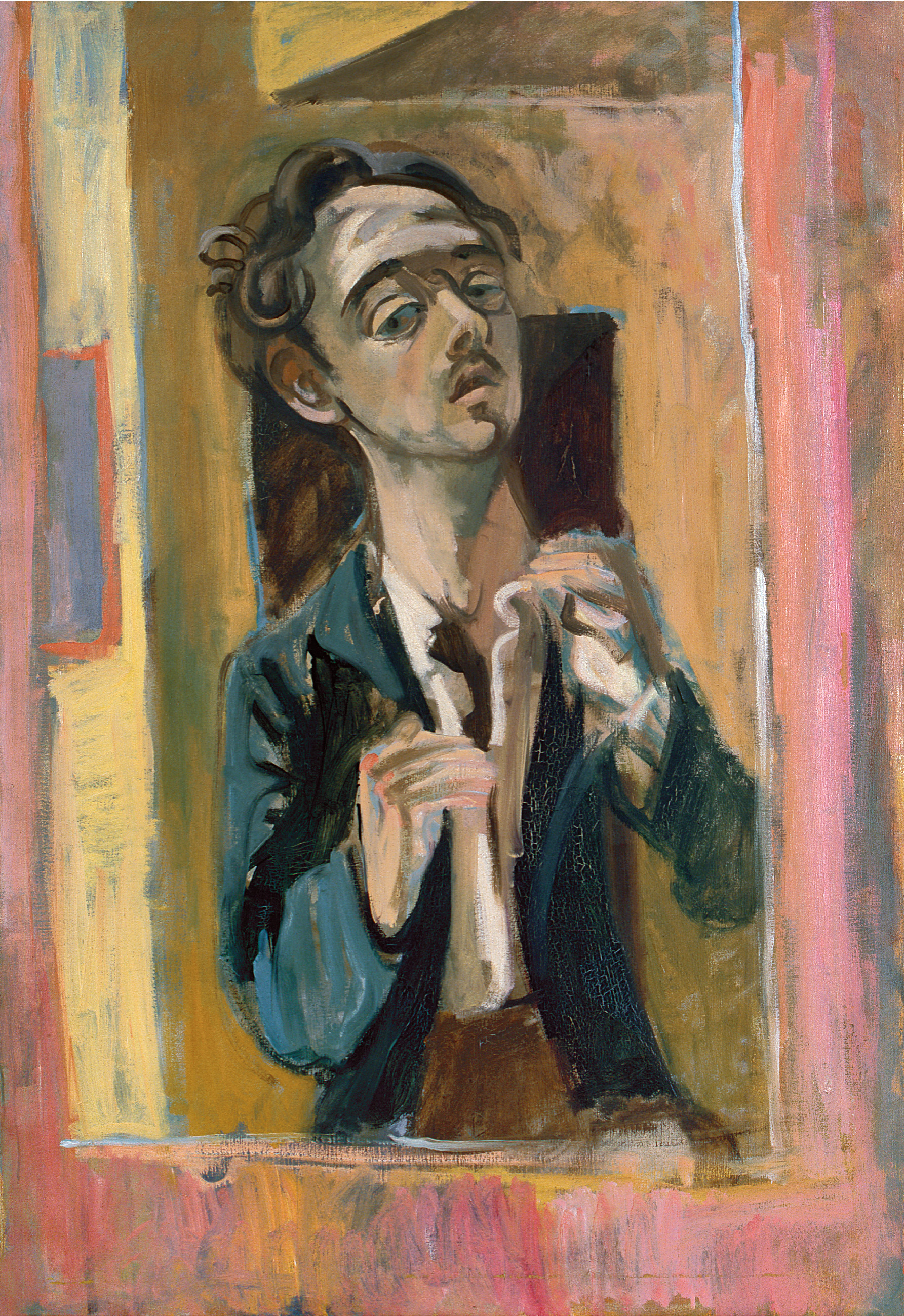 Önarckép